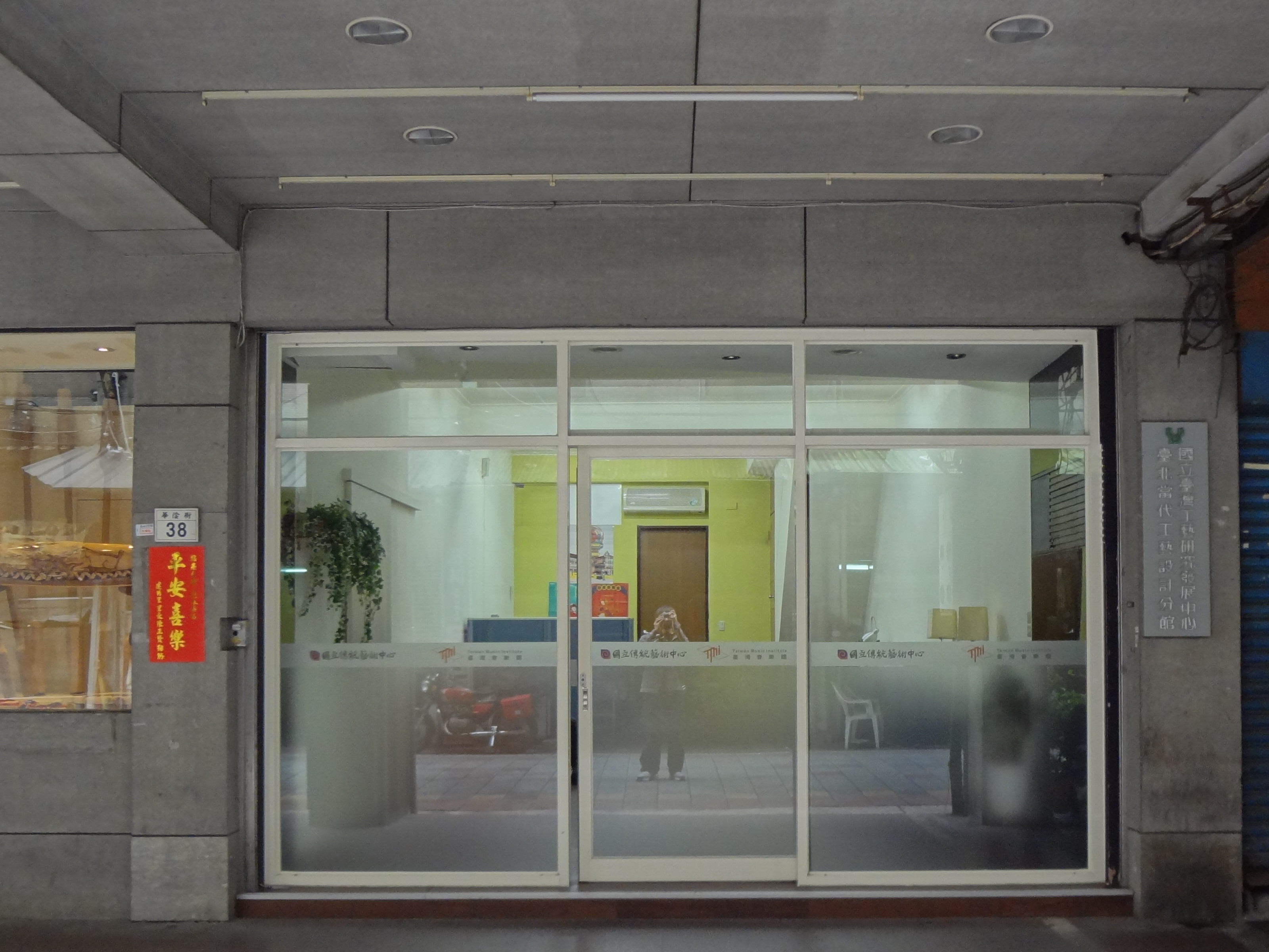 國立臺灣工藝研究發展中心臺北當代工藝設計分館工藝研習教室與國立傳統藝術中心臺灣音樂館辦公室，2017年裁撤，地址：臺北市大同區華陰街36、38號。